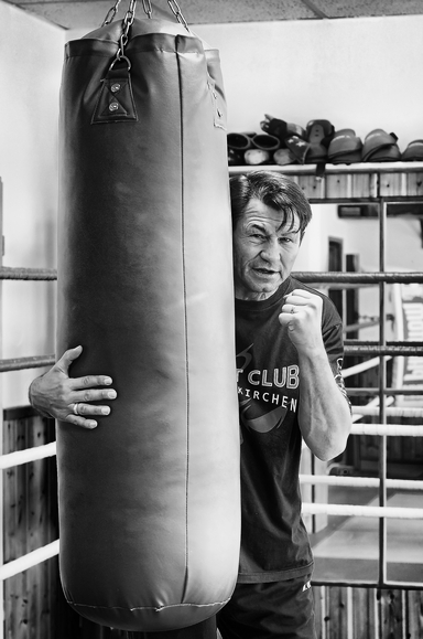 Boxer Michael Kopzog, ehemaliger Deutscher Meister im Boxen. Aufnahme aus dem Jahr 2013. Aufgenommen im Fight Club Gelsenkirchen.